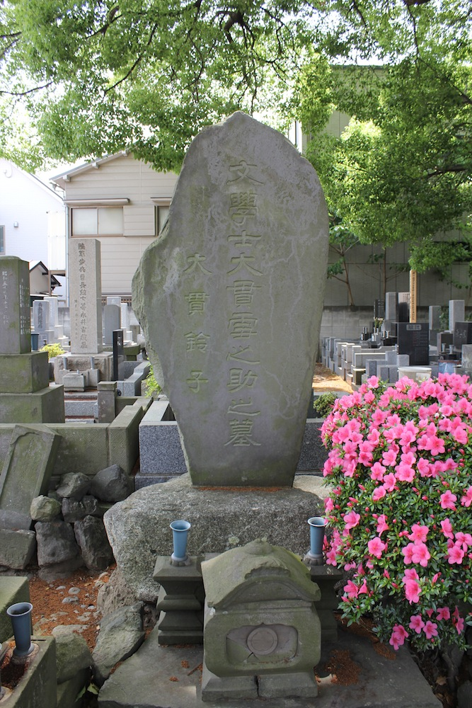 光明寺(川崎市)の大貫雪之助墓碑